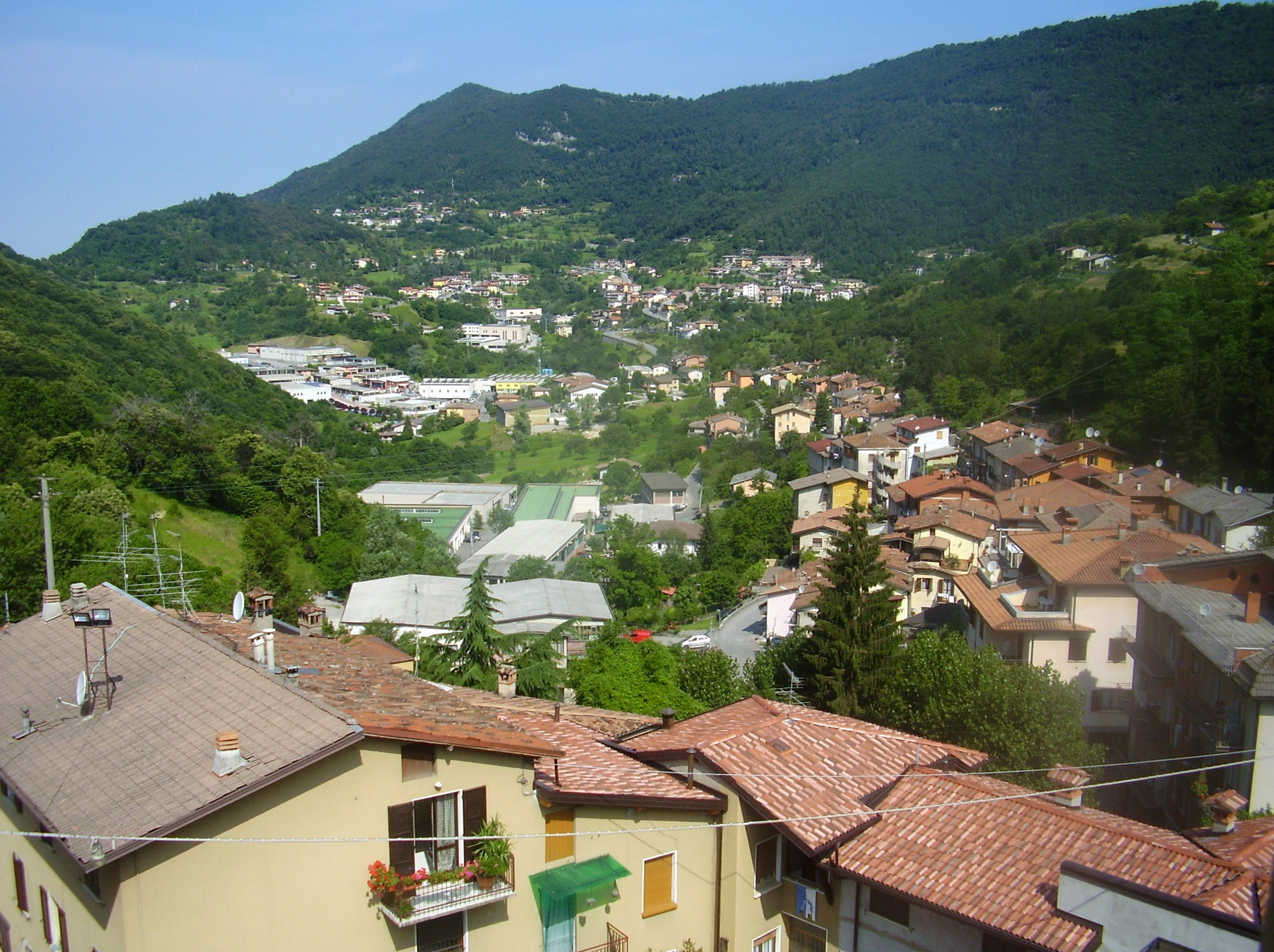 Veduta di San Giovanni e parte di Polaveno